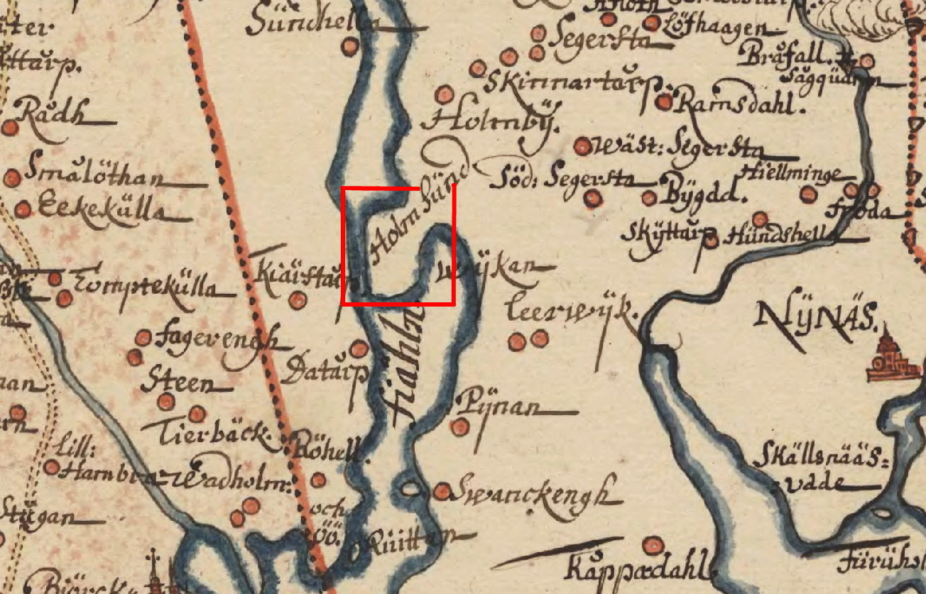 Del av karta över Tystberga och Bälinge socken, Södermanland, visande Sundboholms läge vid Sundhällafjärden (inom röd ram)